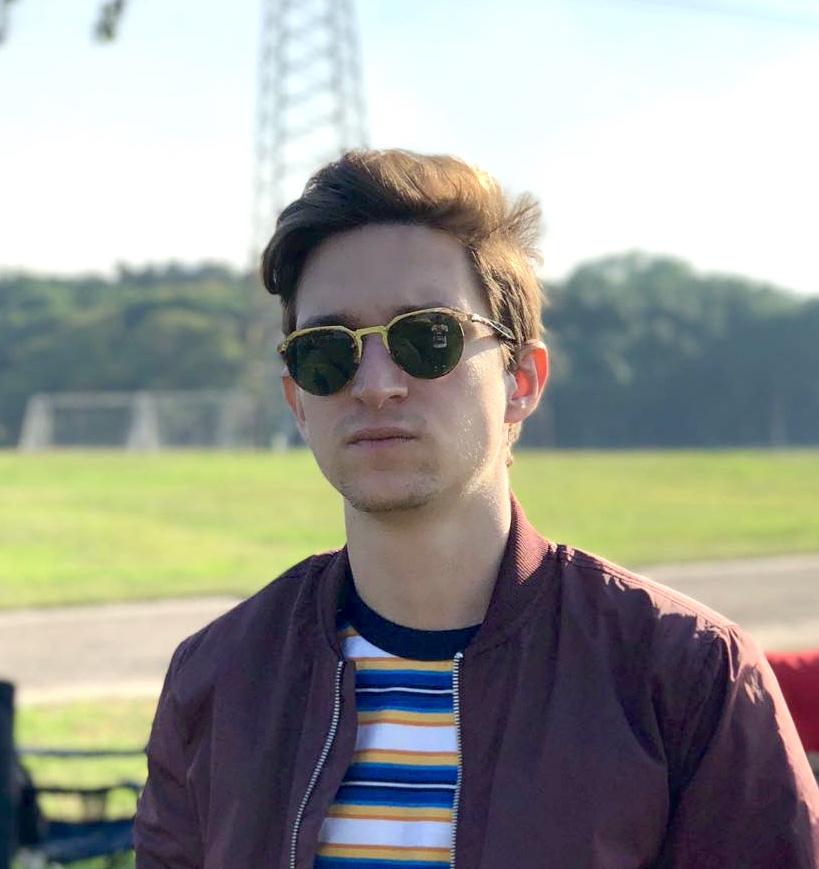 השחקן עונג אפרון בהפקה על סט